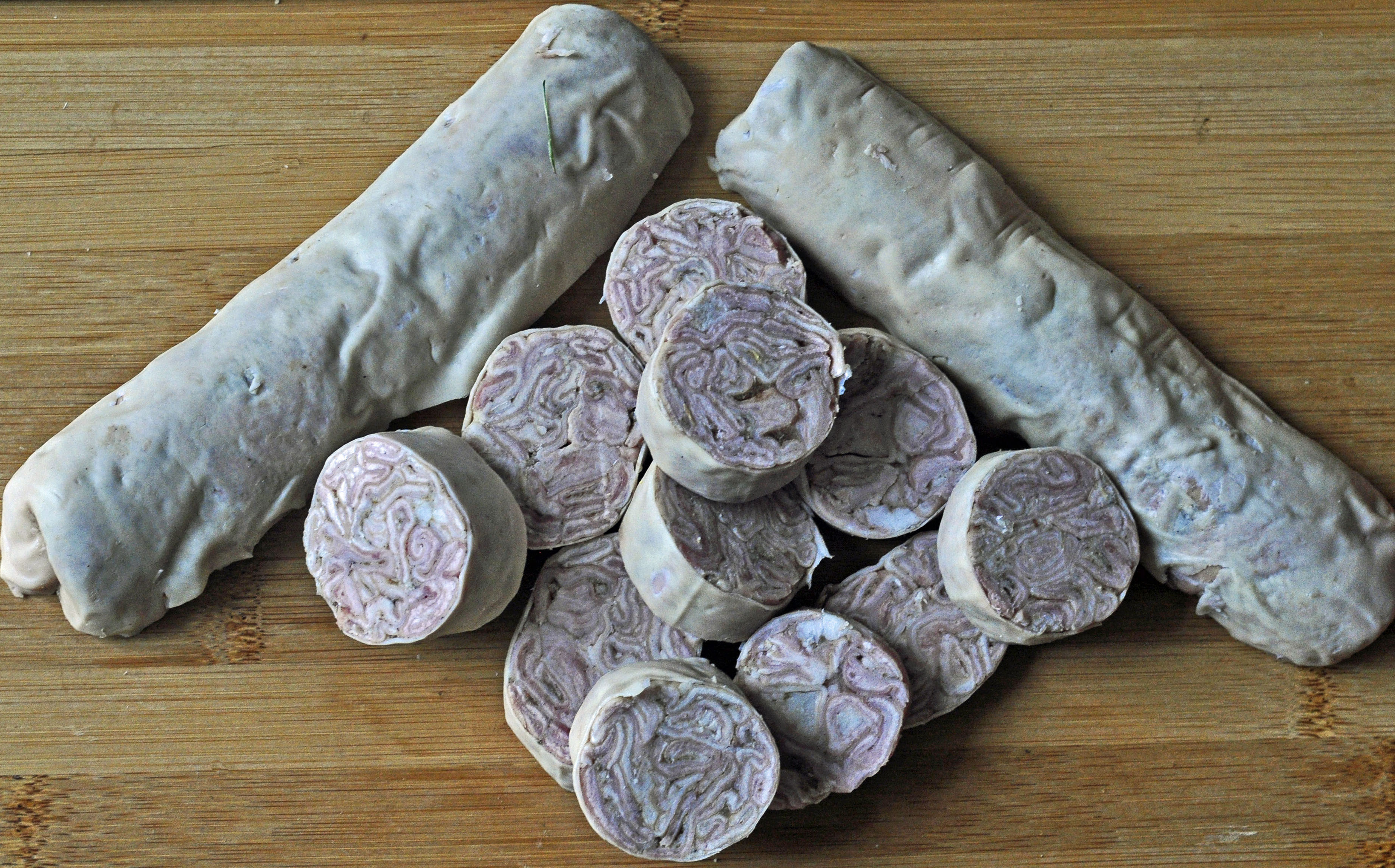 Deux andouillettes tirées à la ficelle par un artisan, et rondelles. On droit à la dénomination particulière Véritable andouillette de Troyes. Produit auquel a été accordé le diplôme de l'AAAAA.